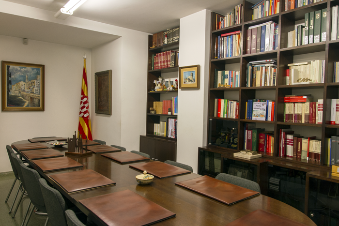 Biblioteca i Sala de Reunions del Col·legi de Mediadors d'Assegurances de Girona